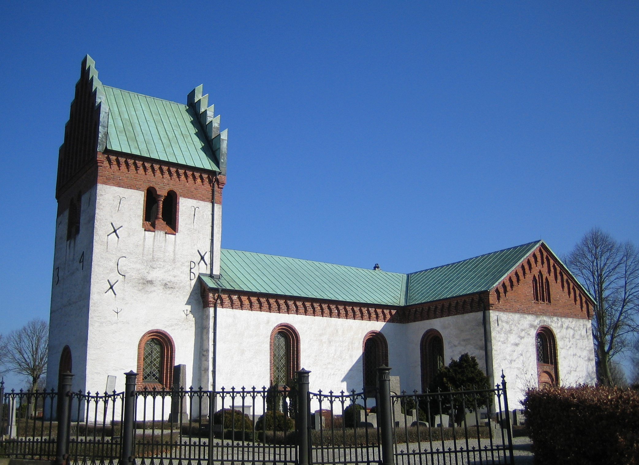 Stora Harrie kyrka in Skåne, Sweden